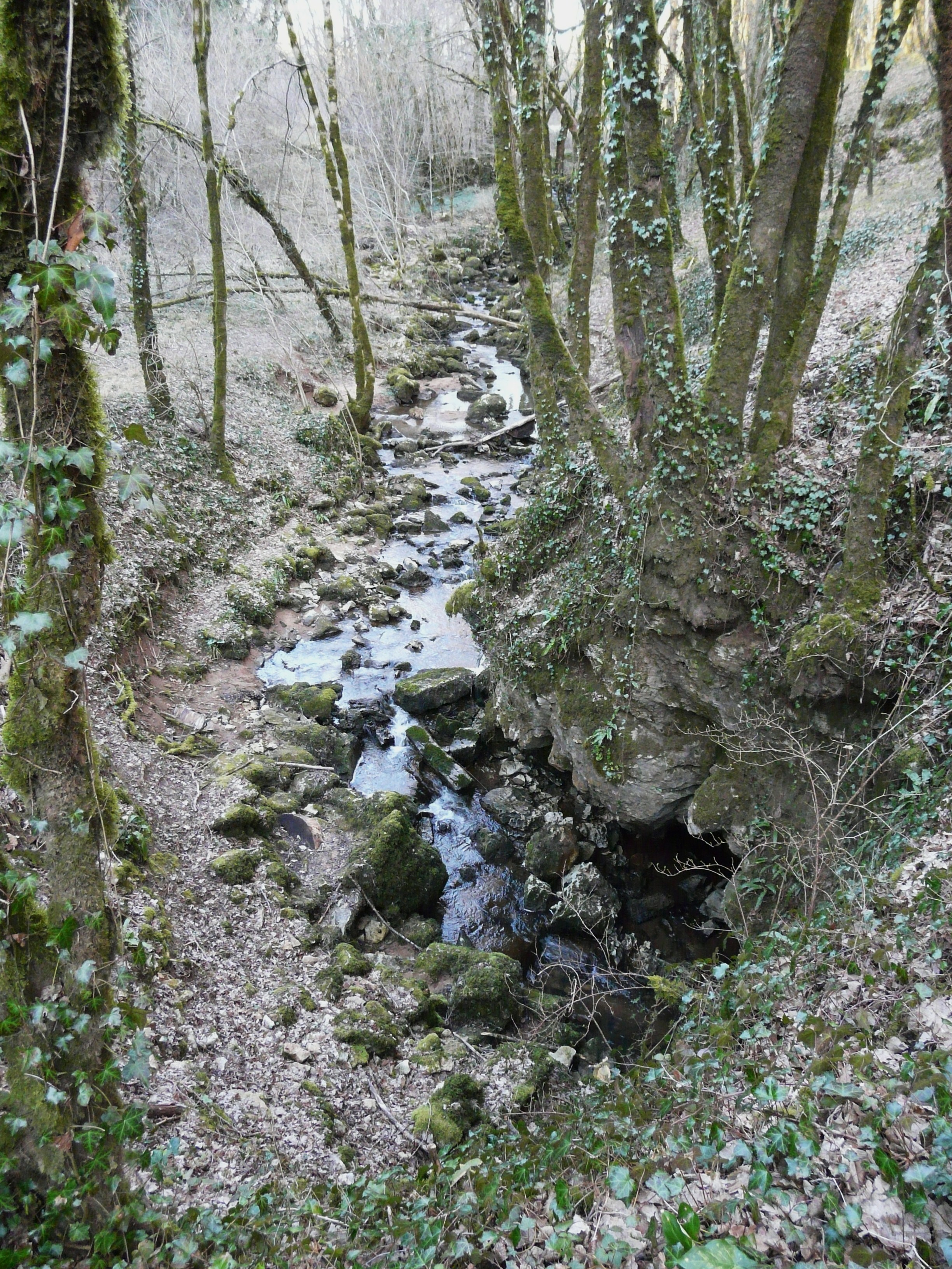 La perte de la Couze dans le causse corrézien au sud-ouest du lieu-dit Couze, Noailles, Corrèze, France.